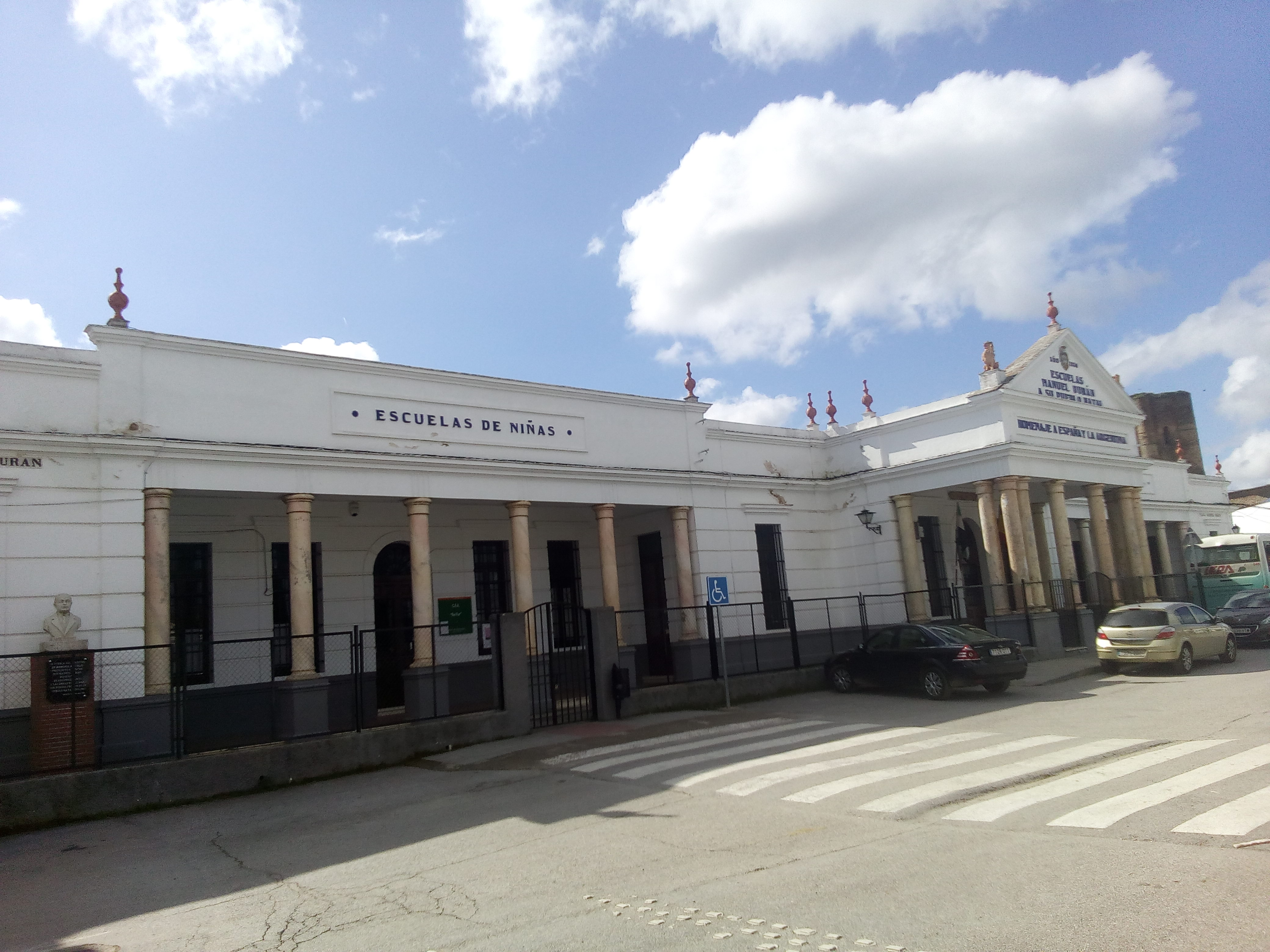 Escuela Publicas Manuel Duran